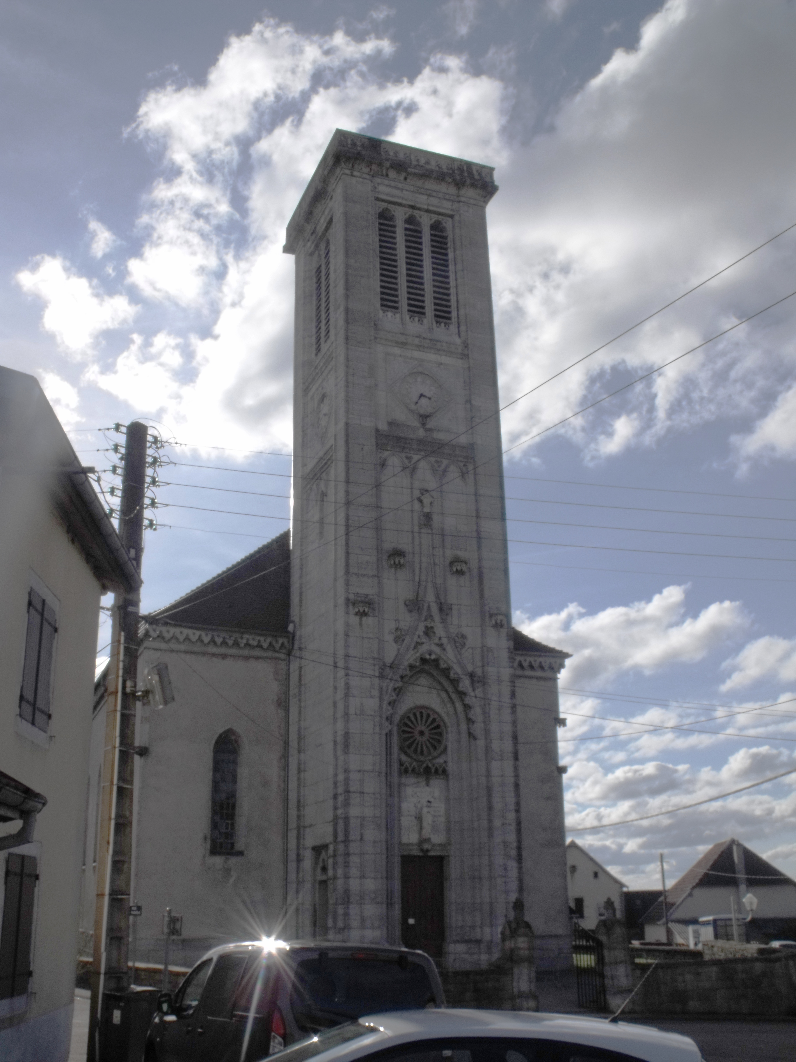 Eglise de l'assomption d'Anteuil, Doubs, France